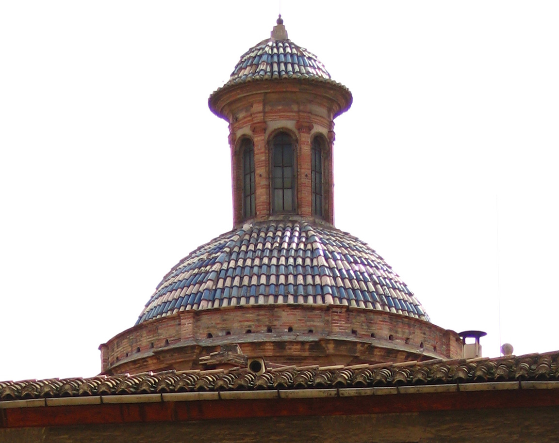 Cúpula del Patriarca de València